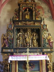 ste barbe